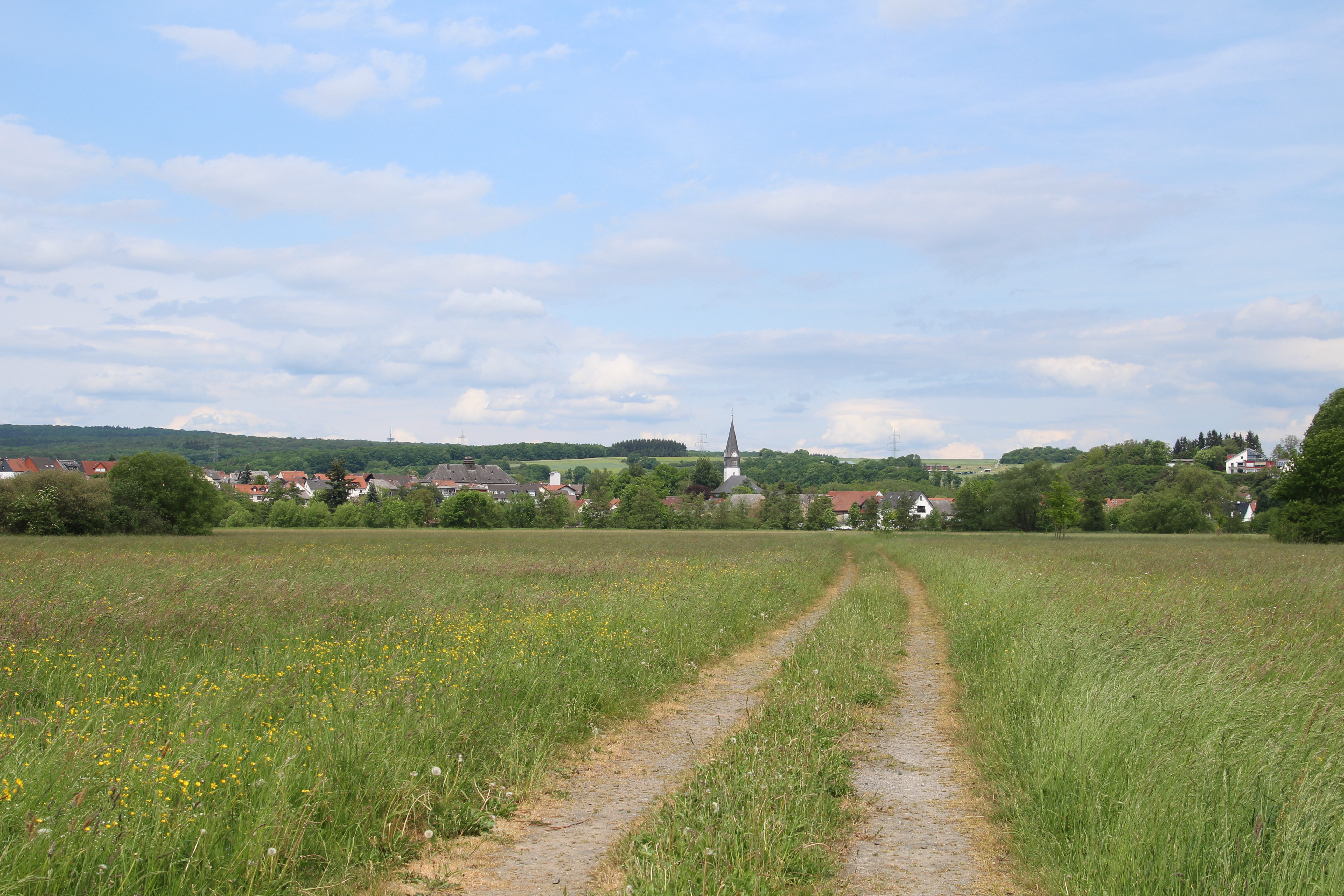 Atzbach